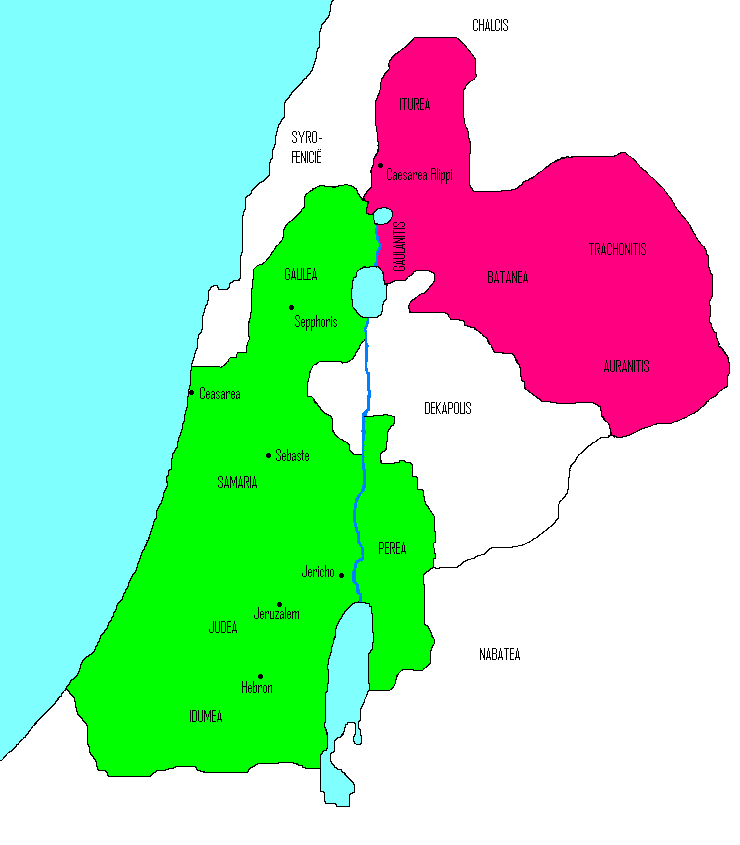 Categorie:Kaart Categorie:Afbeelding oudheid (Original text: Het Joodse land t.t.v. Herodes Agrippa II)